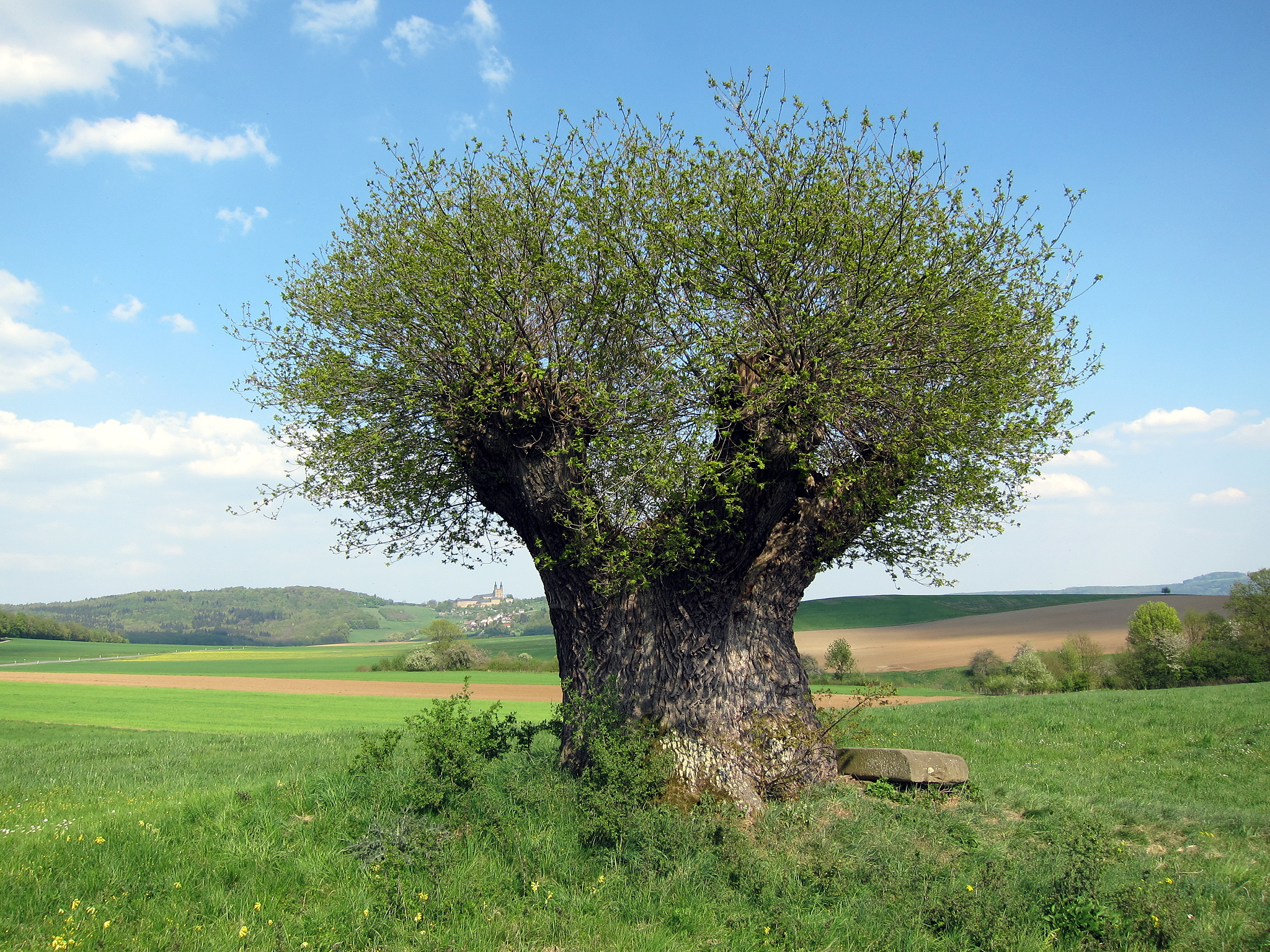 Hüter des Feldes, eine alte Eiche in Bayern